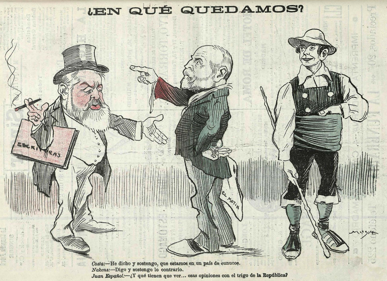 ¿En qué quedamos?, en la revista satírica española Gedeón.